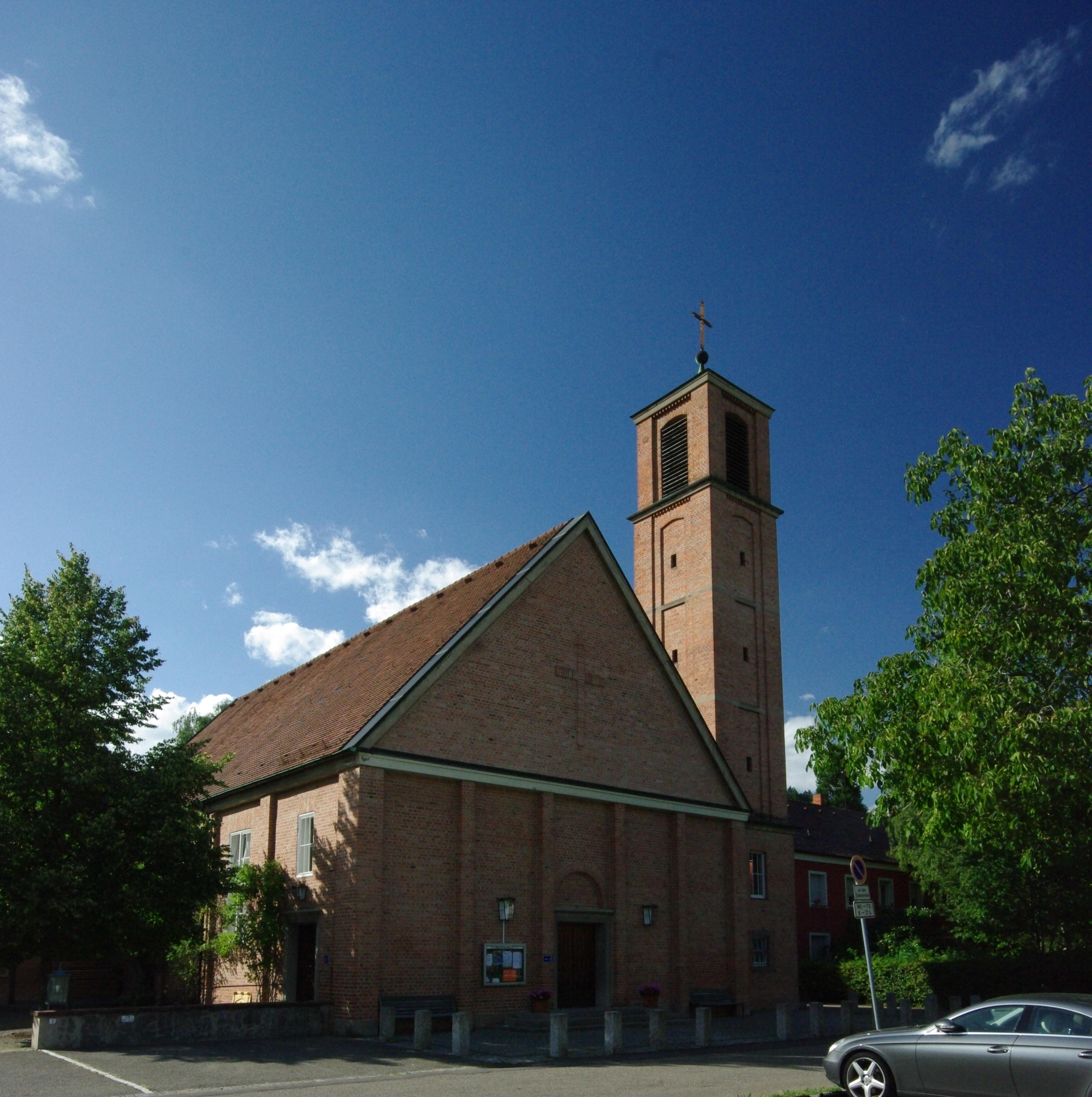 Friedenskirche